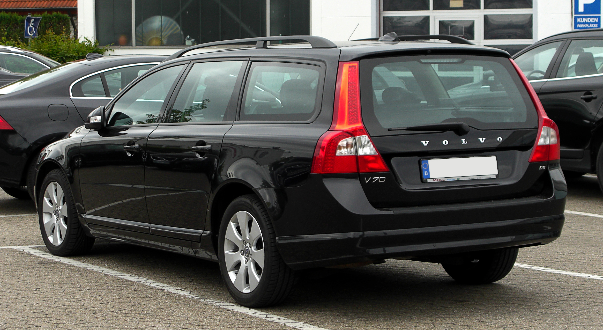 Volvo V70 D5 (III)